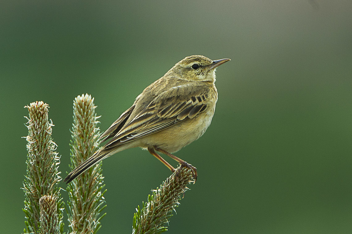 Tawny Pipit - Carso - Italy_S4E5598